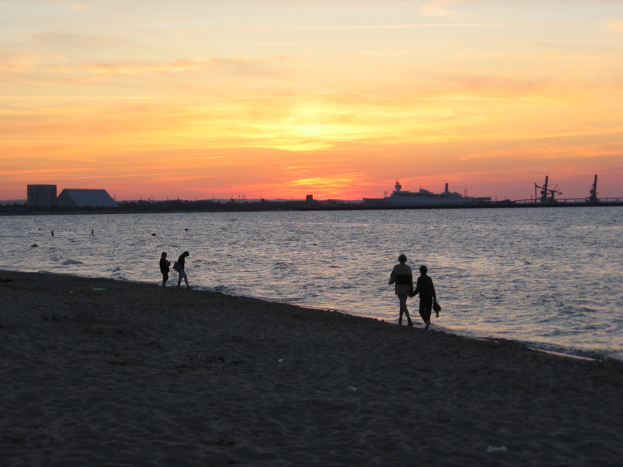 Gdańsk, Stogi-plaża. Zachód Słońca nad Portem Północnym.